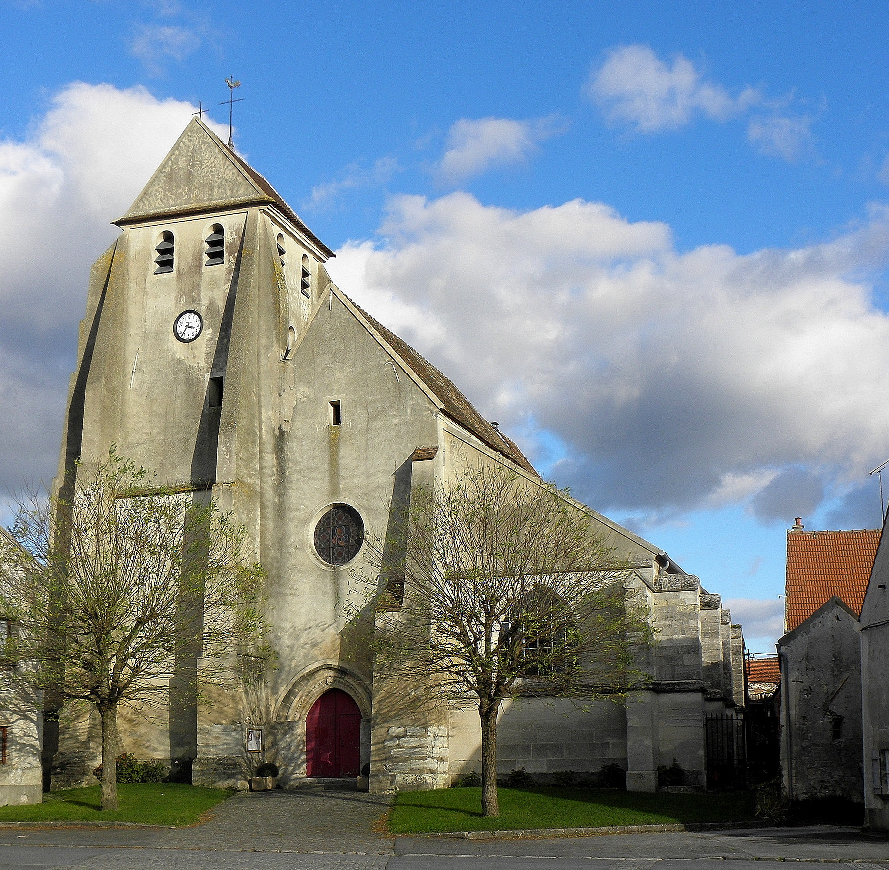 Église Saint-Pierre et Saint-Paul de Chambry (77).